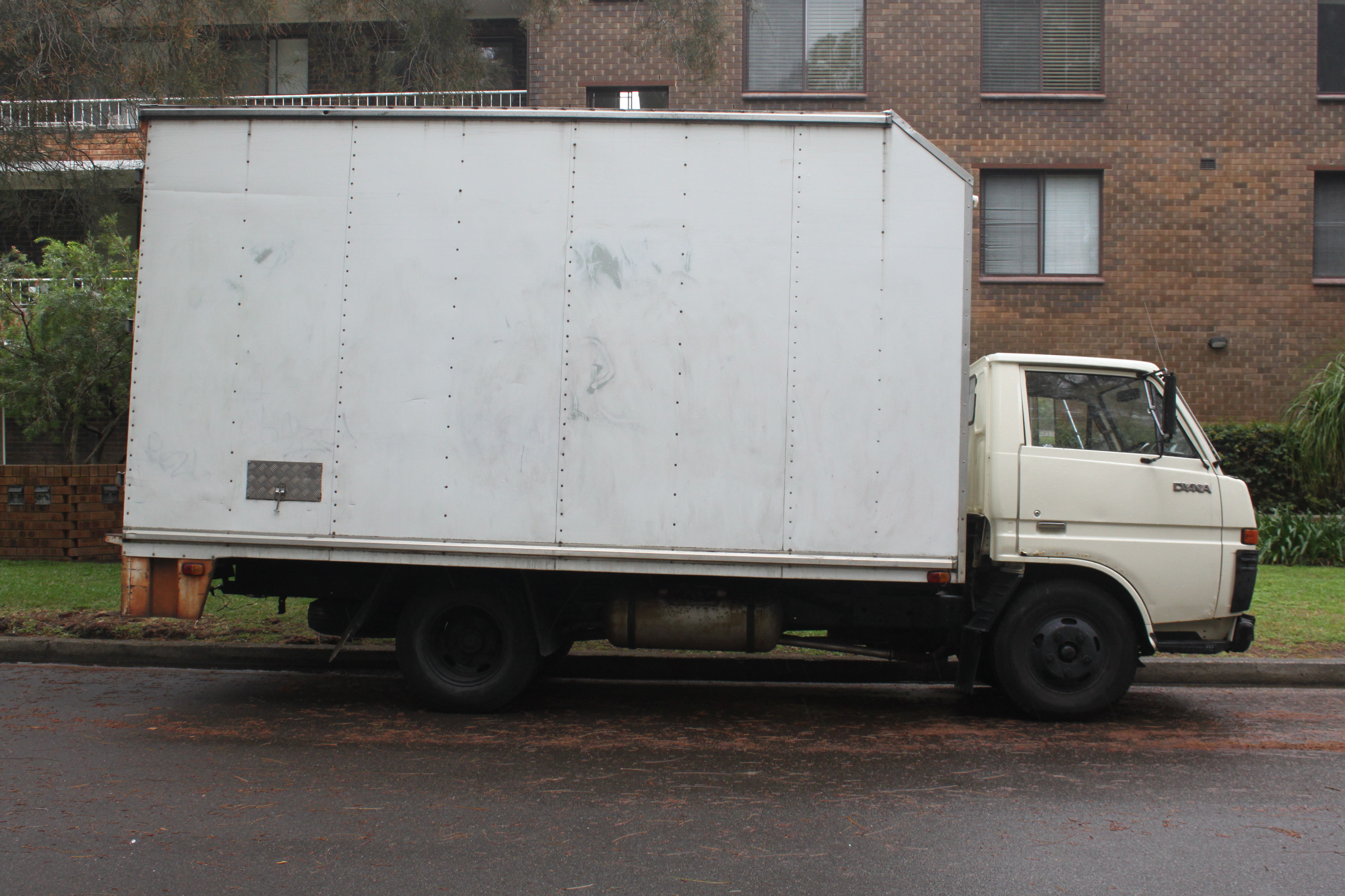 Toyota Dyna BU20R Truck